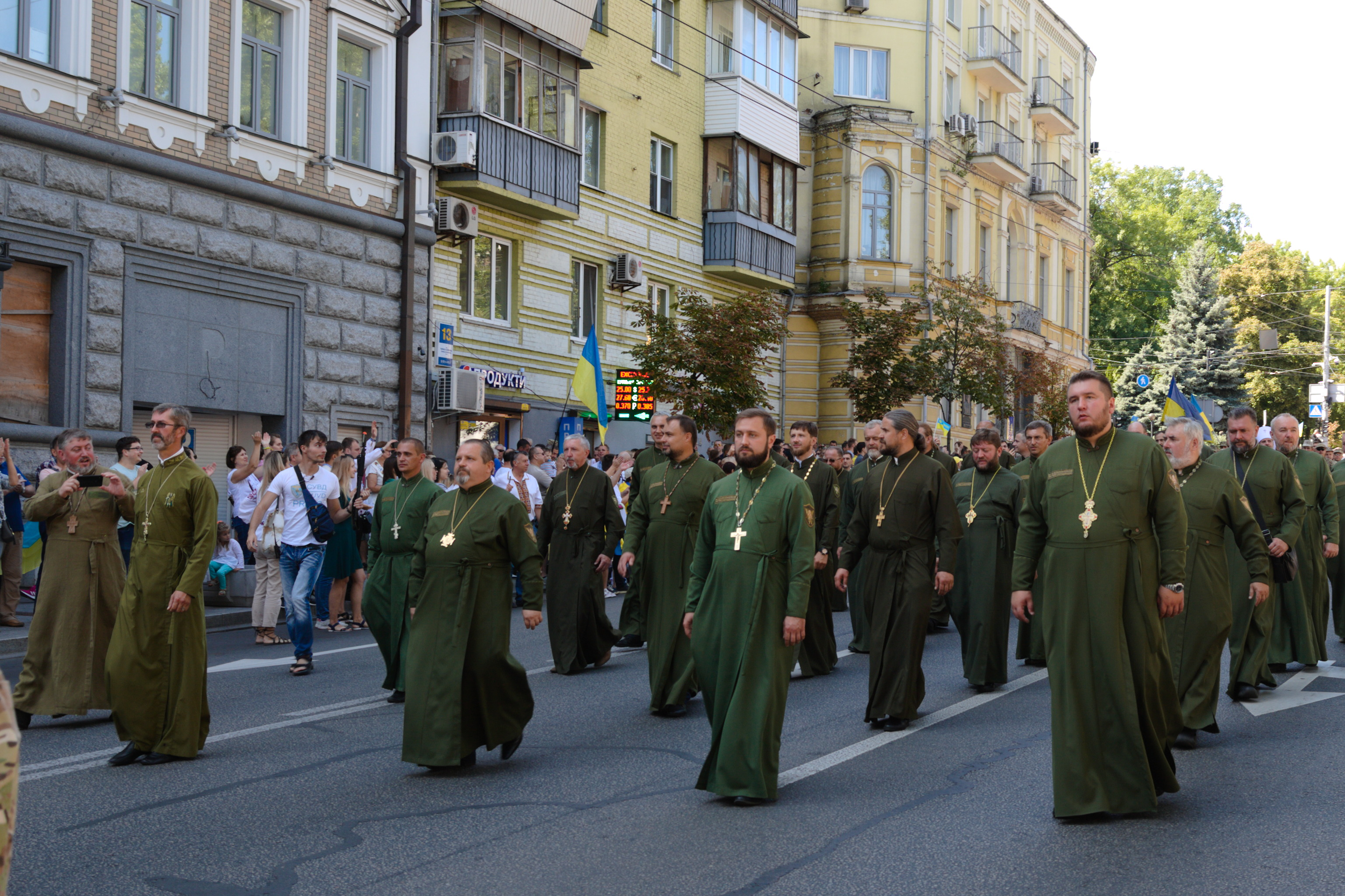 Ветерани війни на сході України — капелани СУВД ПЦУ